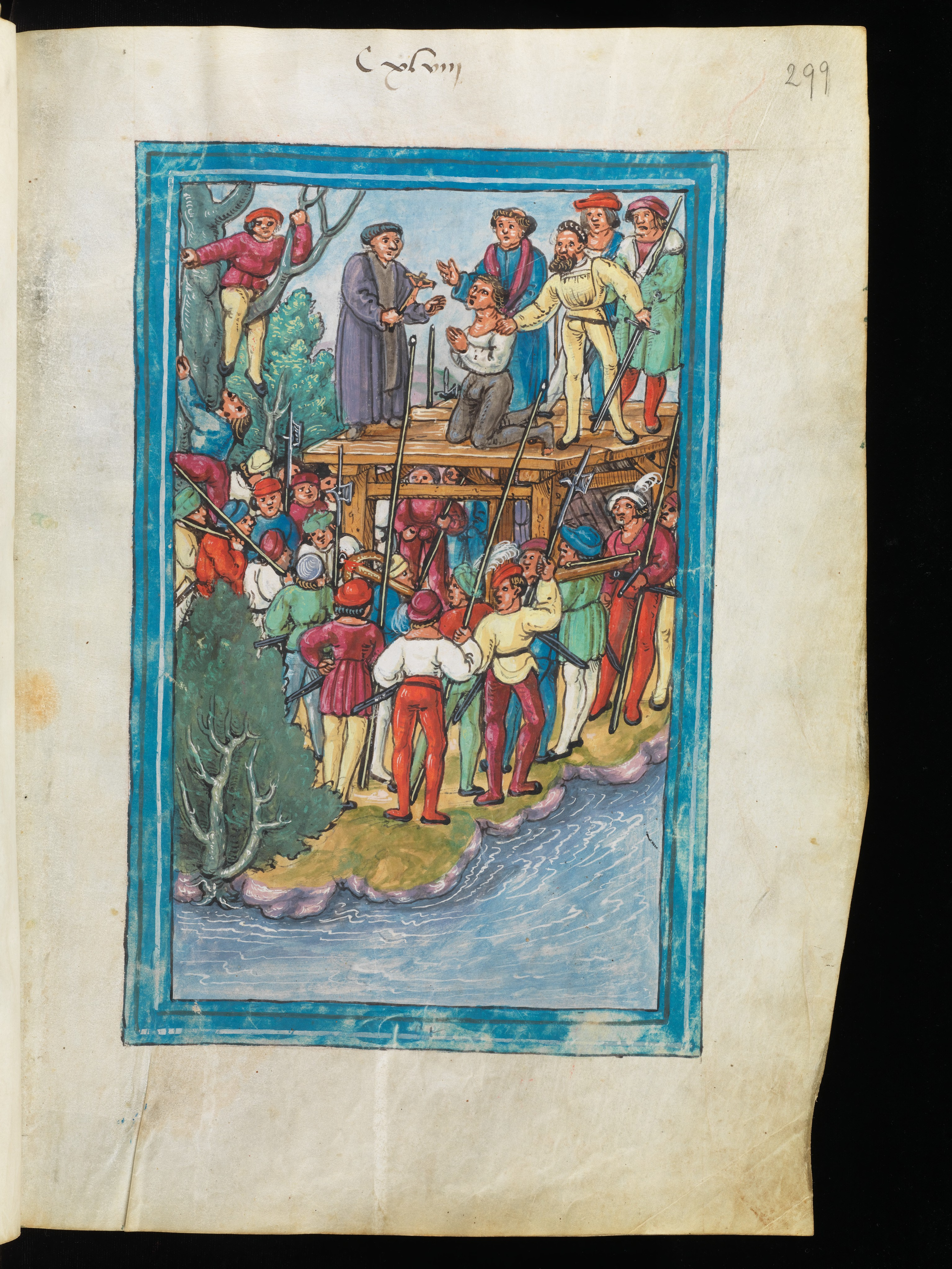 Hans Waldmann (* 1435; † 1489) bei seiner Hinrichtung auf dem Blutgerüst, gezeichnet von Diepold Schilling.